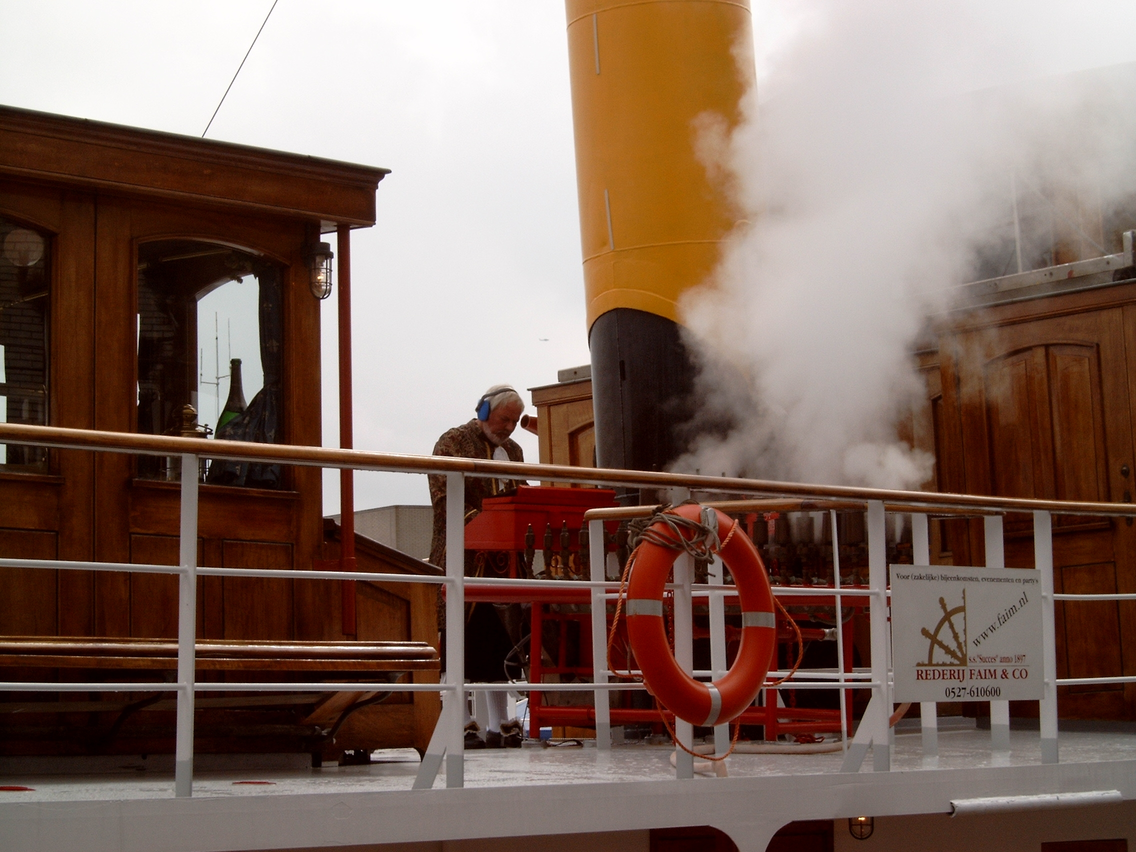 Uniek stoomorgel